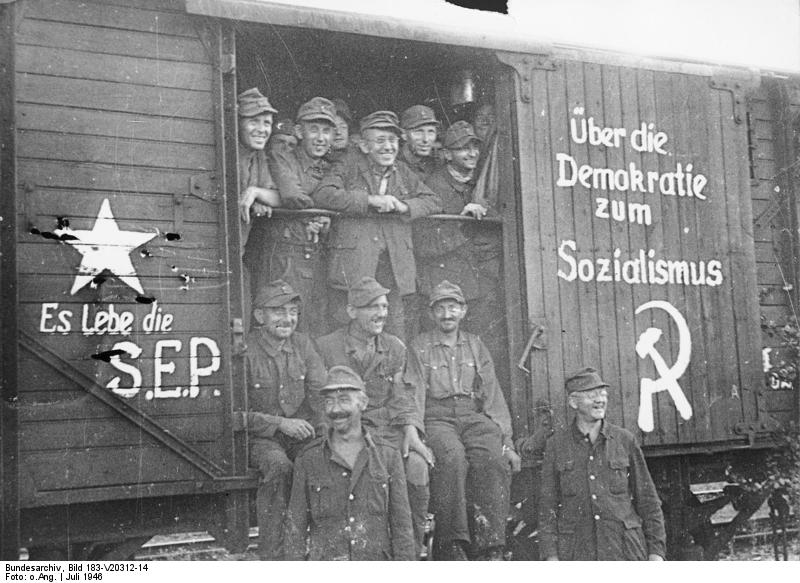 Frankfurt/O., Ankunft entlassener Kriegsgefangener ADN-ZB-Illus Juli 1946: Ankunft der ersten 3000 entlassenen Kriegsgefangenen aus der Sowjetunion in Frankfurt/Oder. [Frankfurt/Oder - Gronenfelde]